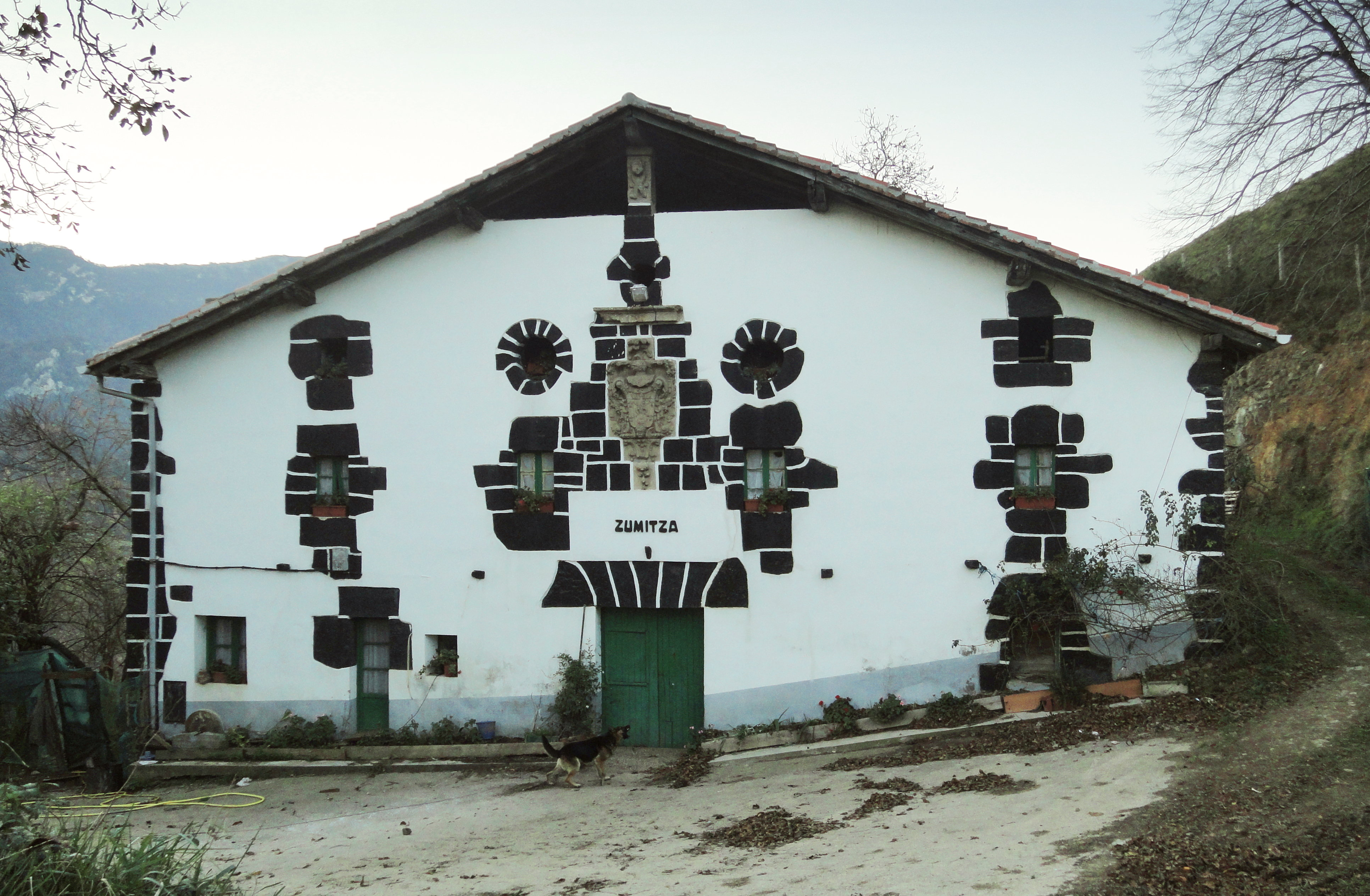 Zumitza baserria - Alkiza